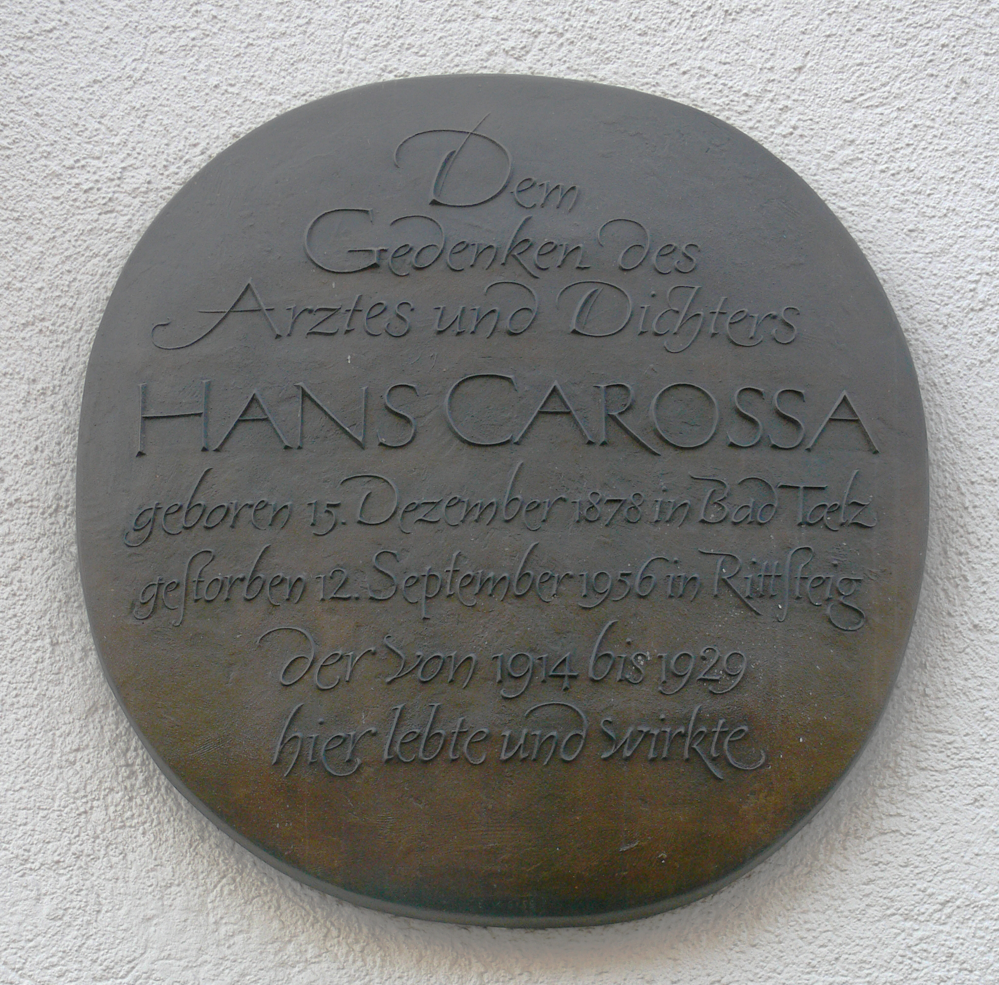 München, Gedenktafel für Hans Carossa in der Türkenstraße / Ecke Theresienstraße